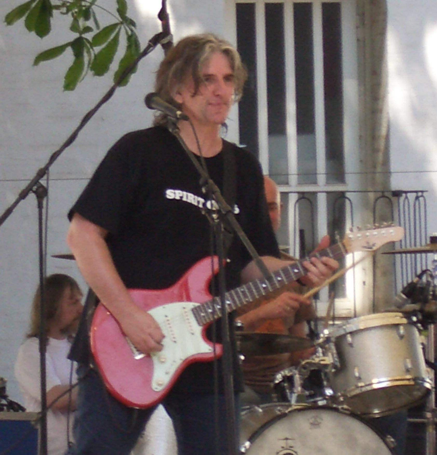 Rob Tognoni bei einer Matinée der Reihe "Sonntags ans Schloss" in Saarbrücken